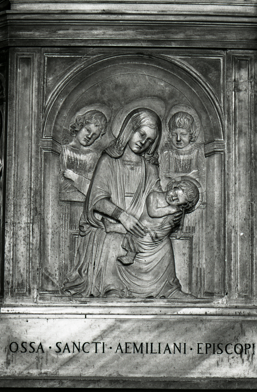 Servizio fotografico : Faenza, 1979 / Paolo Monti. - Strisce: 7, Fotogrammi complessivi: 36 : Negativo b/n, gelatina bromuro d'argento/ pellicola ; 35 mm. - ((Sul portanegativi: N[I]K[MA]T FP4. - Occasione: Documentazione Musei e Palazzi di Faenza per mostra "L'età Neoclassica a Faenza" [Felice Giani] su ordinazione del Professor Andrea Emiliani. - Fonte: Agenda di Paolo Monti: Nikon Leika 3001-/ Monti 1978 (1978-1982), presso Archivio Paolo Monti. - Fonte: Fattura di Paolo Monti: IV. Commesse/ Fattura n. 31/ Fotografie Palazzo Milzetti per mostra L'età Neoclassica a Faenza (1979/10/08), presso Archivio Paolo Monti. - Fonte: Fattura di Paolo Monti: IV. Commesse/ Fattura n. 22/ Fotografie Musei e Palazzi [e Cappelle del Duomo] di Faenza (1979/07/02), presso Archivio Paolo Monti. Riprese fotografiche palazzi, affreschi, sculture Museo Civico, Duomo, Palazzi e Chiese. - Fonte: Monografia di Biennale d'Arte Antica (10. ; 1979): L'età neoclassica a Faenza, 1780-1820: Faenza, Palazzo Milzetti, 9 settembre-26 novembre 1979, catalogo della mostra, Faenza 1979, a cura di Anna Ottani Cavina, in L'arte del Settecento in Emilia e in Romagna, Bologna, Alfa (1979)